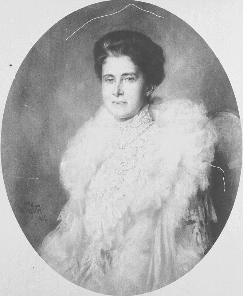 Hilda Charlotte Wilhelmine, Prinzessin von Nassau (Tochter des Großherzogs Adolf von Luxemburg)